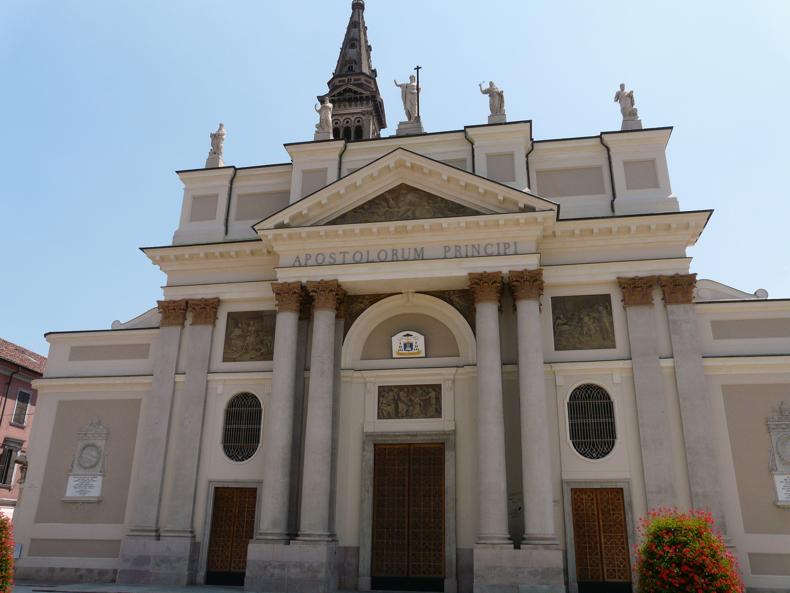 Duomo di Alessandria, Piemonte, Italia